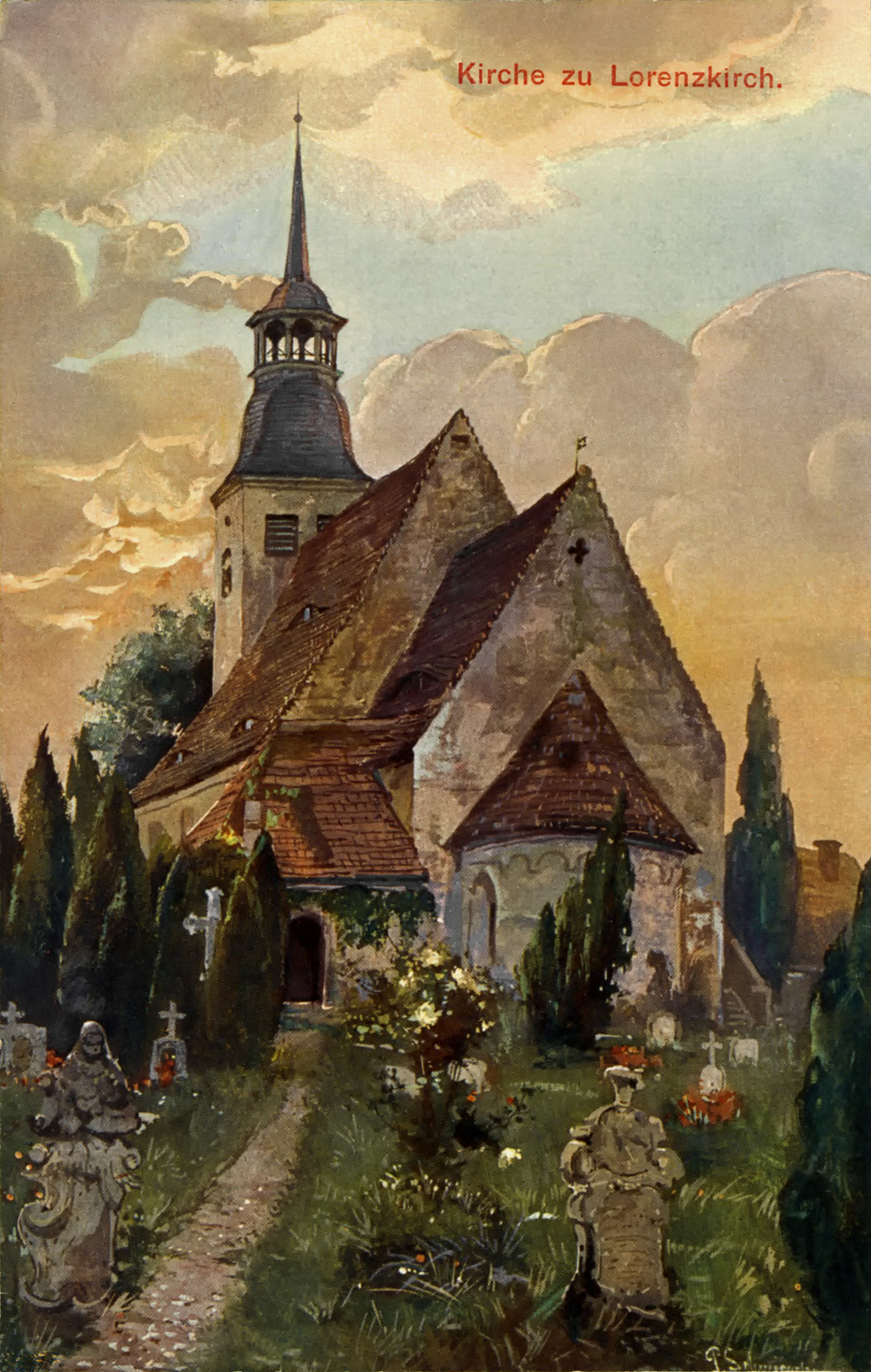 Laurentiuskirche in Lorenzkirch, Sachsen, Deutschland. Vom 13. Jahrhundert bis zur Reformation blieb die Laurentiuskirche eine Wallfahrtskirche, und der Laurentiusmarkt wurde anfangs jeweils am 10. August, dem Laurentiustag genannten Sterbetag des Laurentius von Rom, abgehalten. Der auf der Talsanddüne entstandene Ort Lorenzkirch hatte ab 1791 als Marktflecken mit seinen 1834 neu bestätigten Marktrechten eine große wirtschaftliche Bedeutung wegen des Lorenzmarktes, der Pferdezüchter, Viehzüchter, Händler und Handwerker aus weitem Umkreis anzog. In der Gegenwart wird der Lorenzmarkt als mehrtägiges Volksfest mit einem eintägigen Verkaufsmarkt begangen.